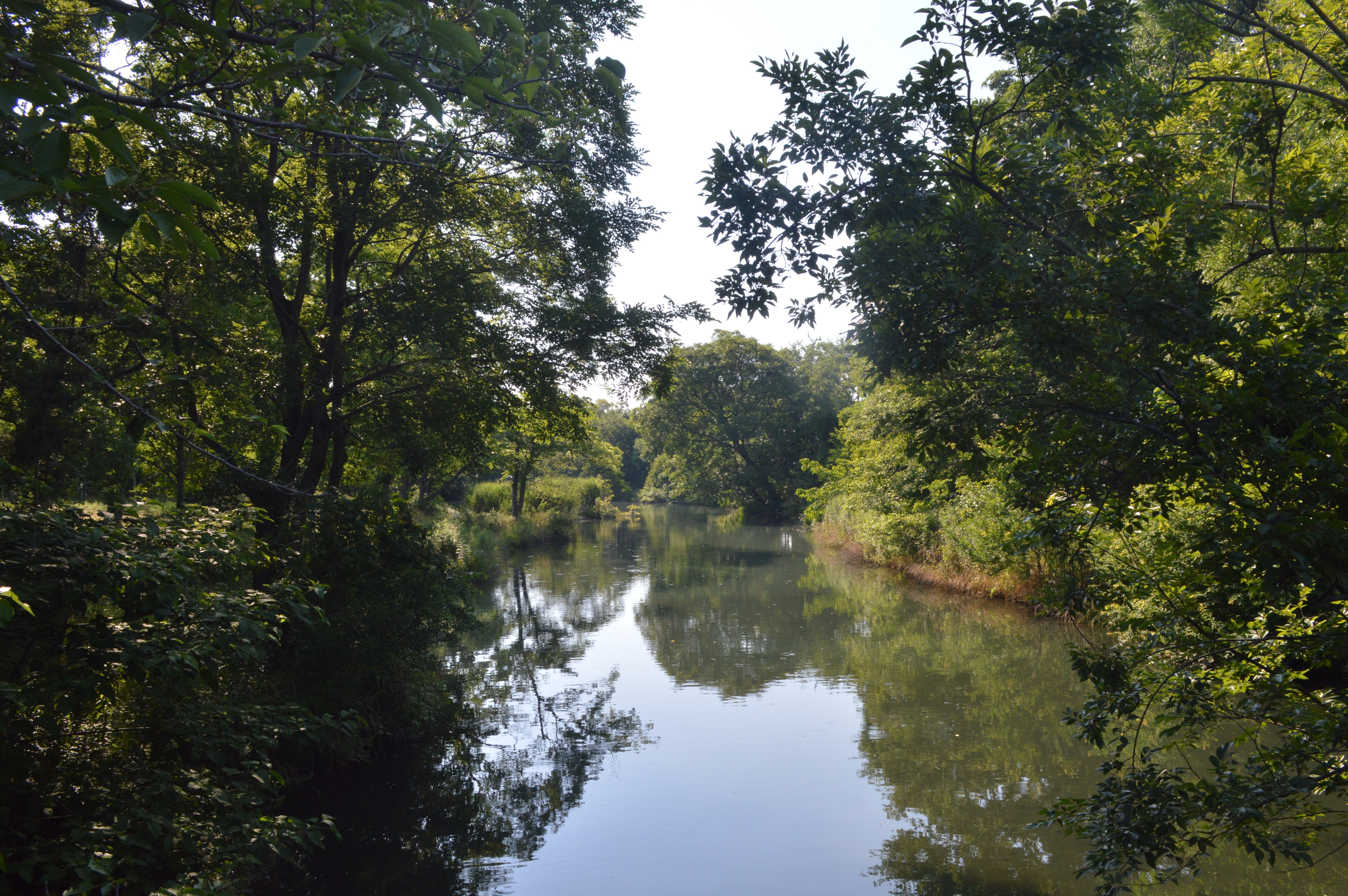 岐阜県各務原市河田町（旧・羽島郡川島町）にある河跡湖公園。